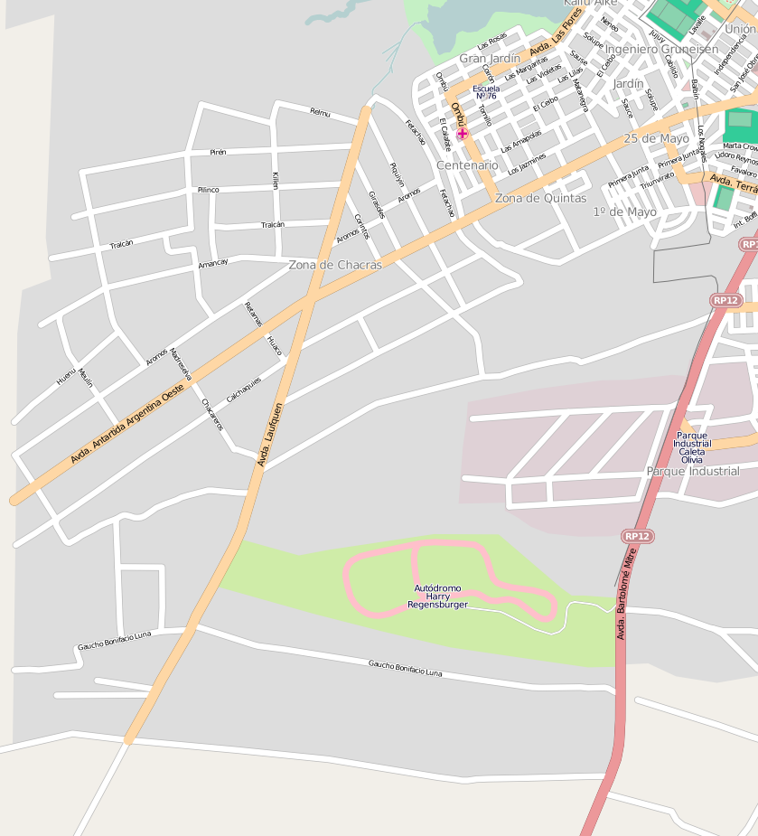 Plano del Barrio Zona de Chacras